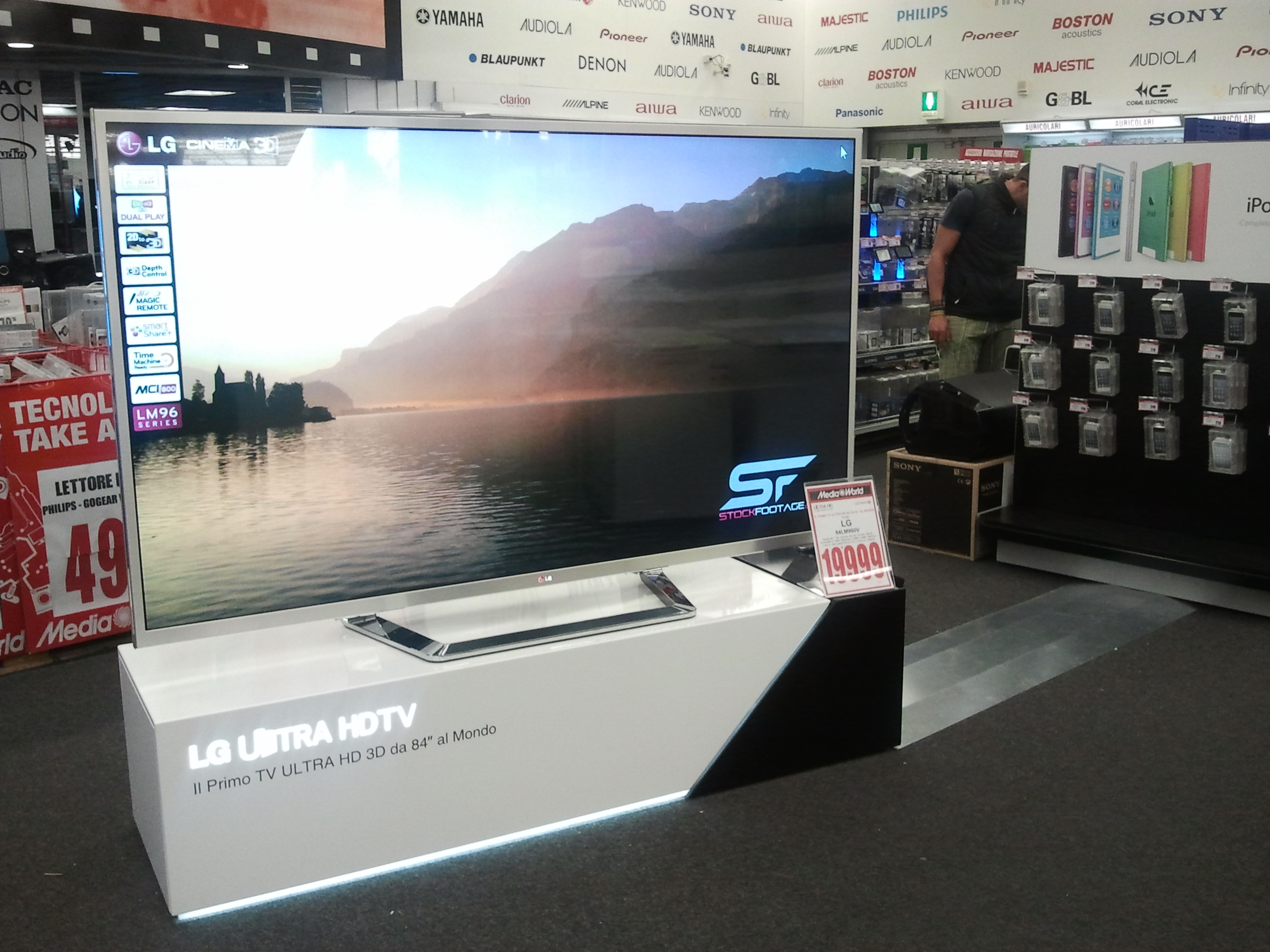 HD TV 84